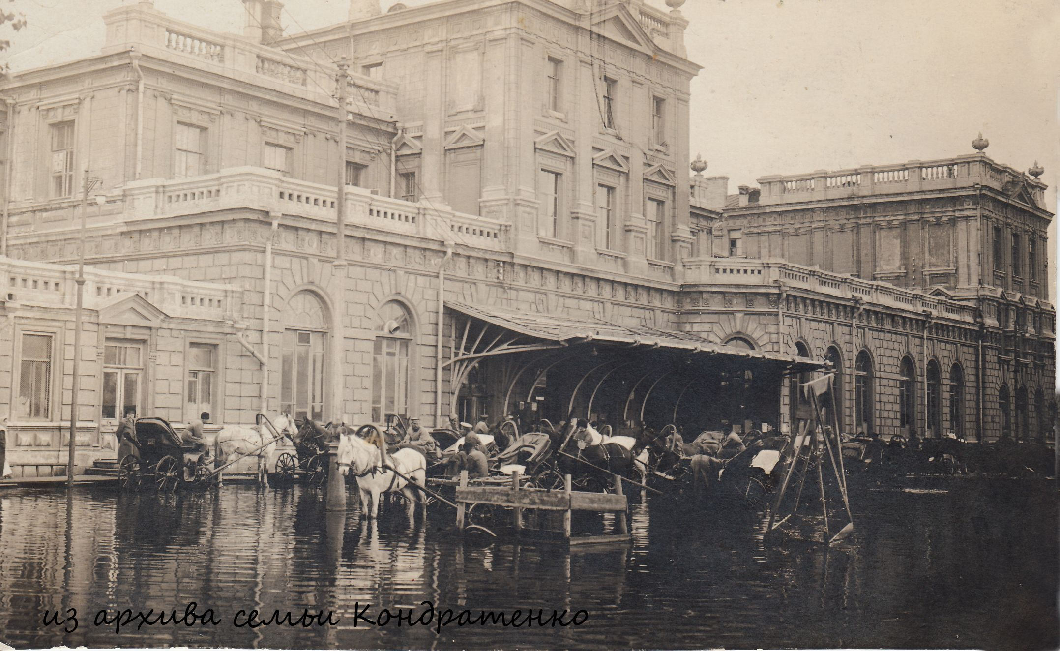 Ростов-на-Дону. Вокзал. 1918